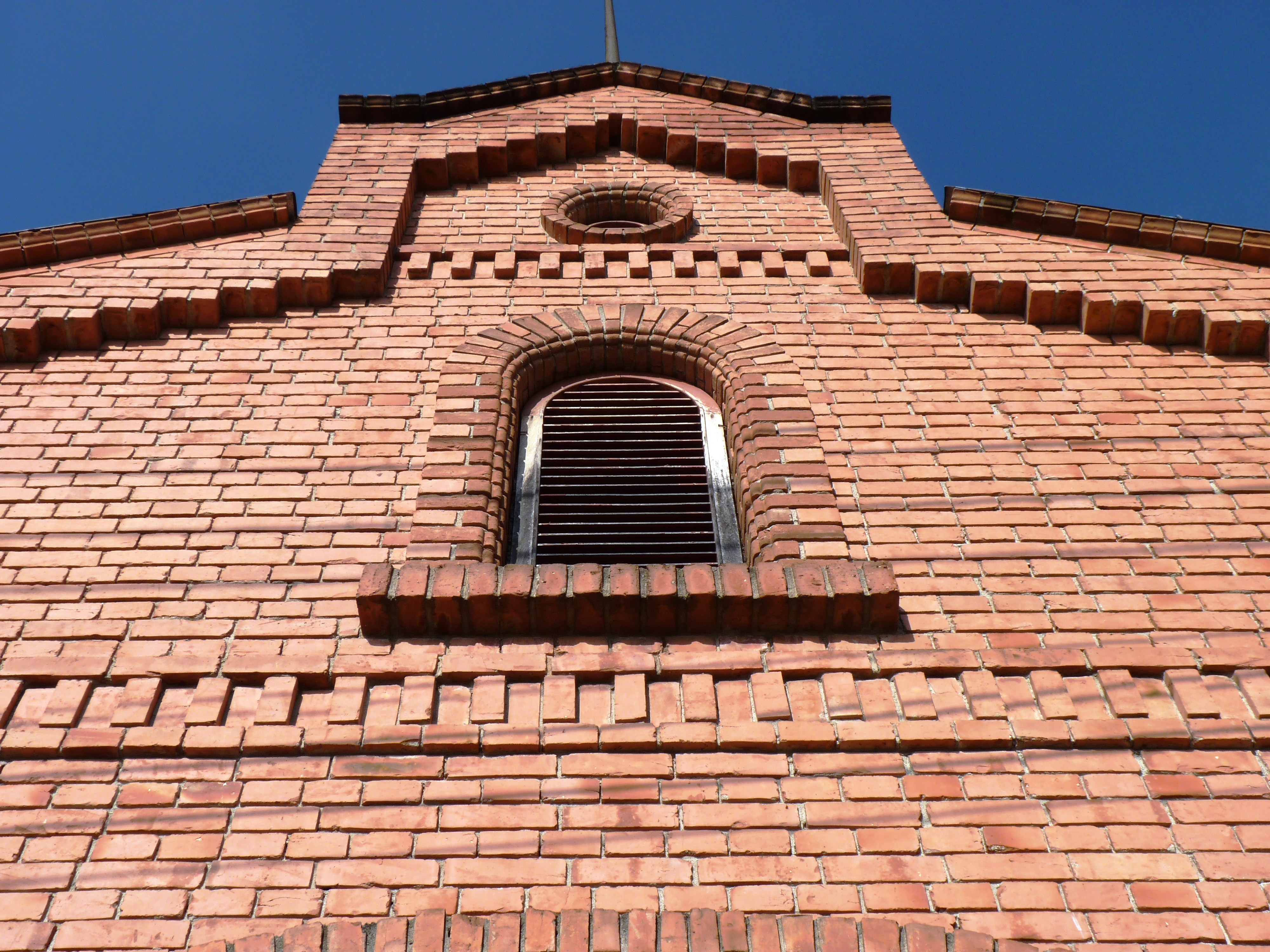 Vila Mariana - São Paulo